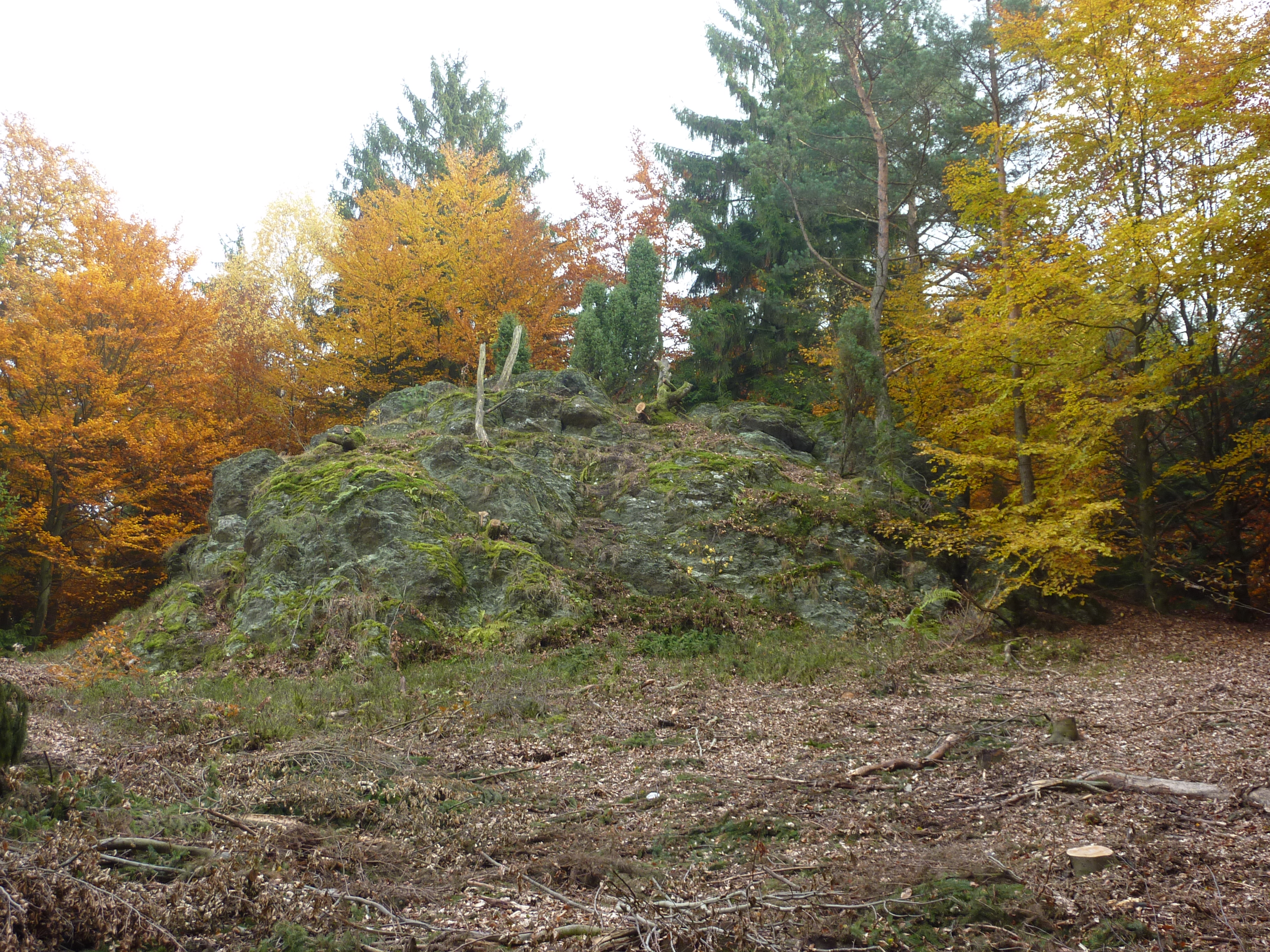 Kopps-Klippen bei Bad Endbach